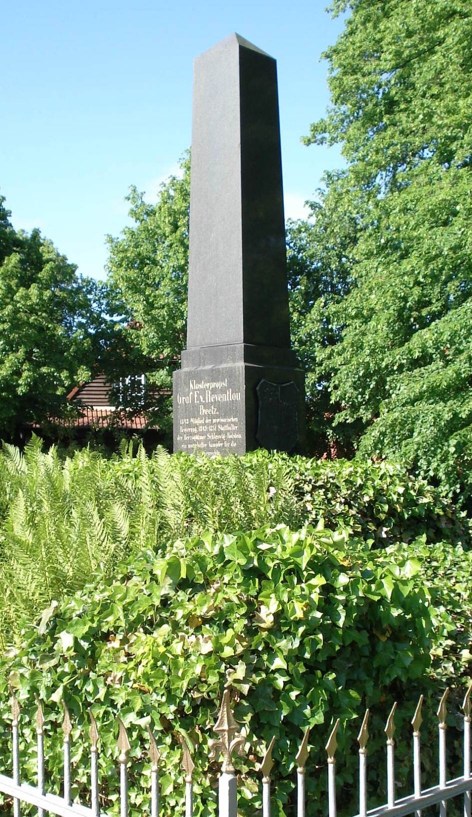 Denkmal für Friedrich von Reventlou